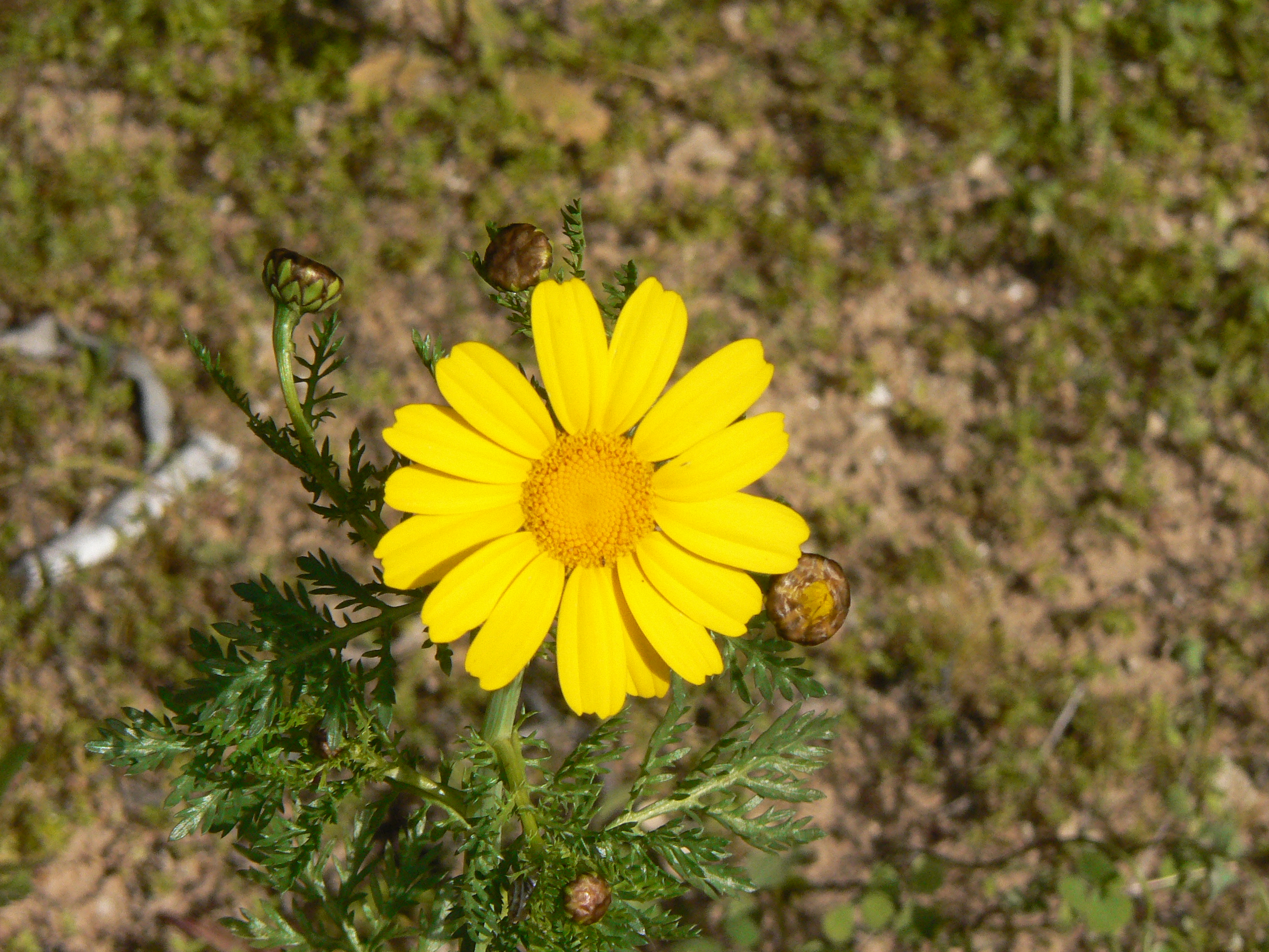 חרצית עטורה Chrysanthemum coronarium